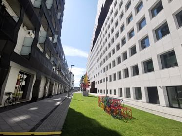 Rostockgata sett fra nord